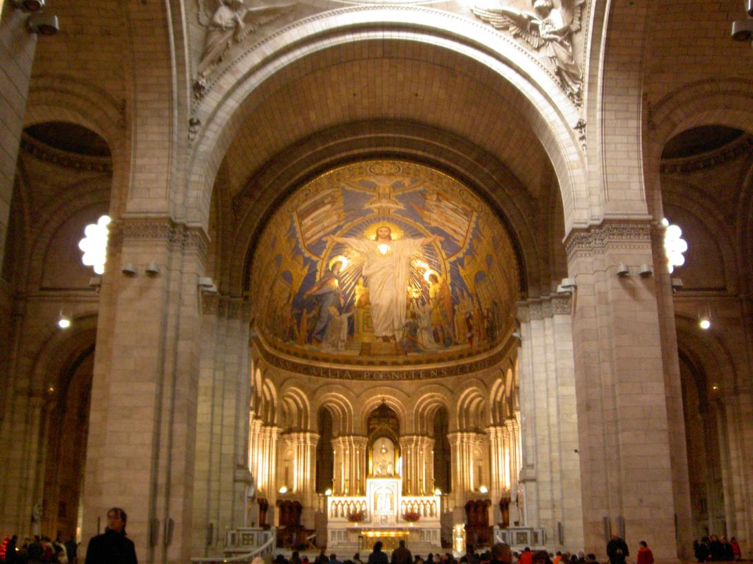 Blick aus dem Kircheninnenraum auf die Apsis mit dem Christusmosaik von Luc-Olivier Merson. Die Inschrift lautet: Mio Cordi Jesu Gallia Poenitens et devota et gratia. Darunter der Hochaltar. (März 2005, selbst fotografiert von Robysan)